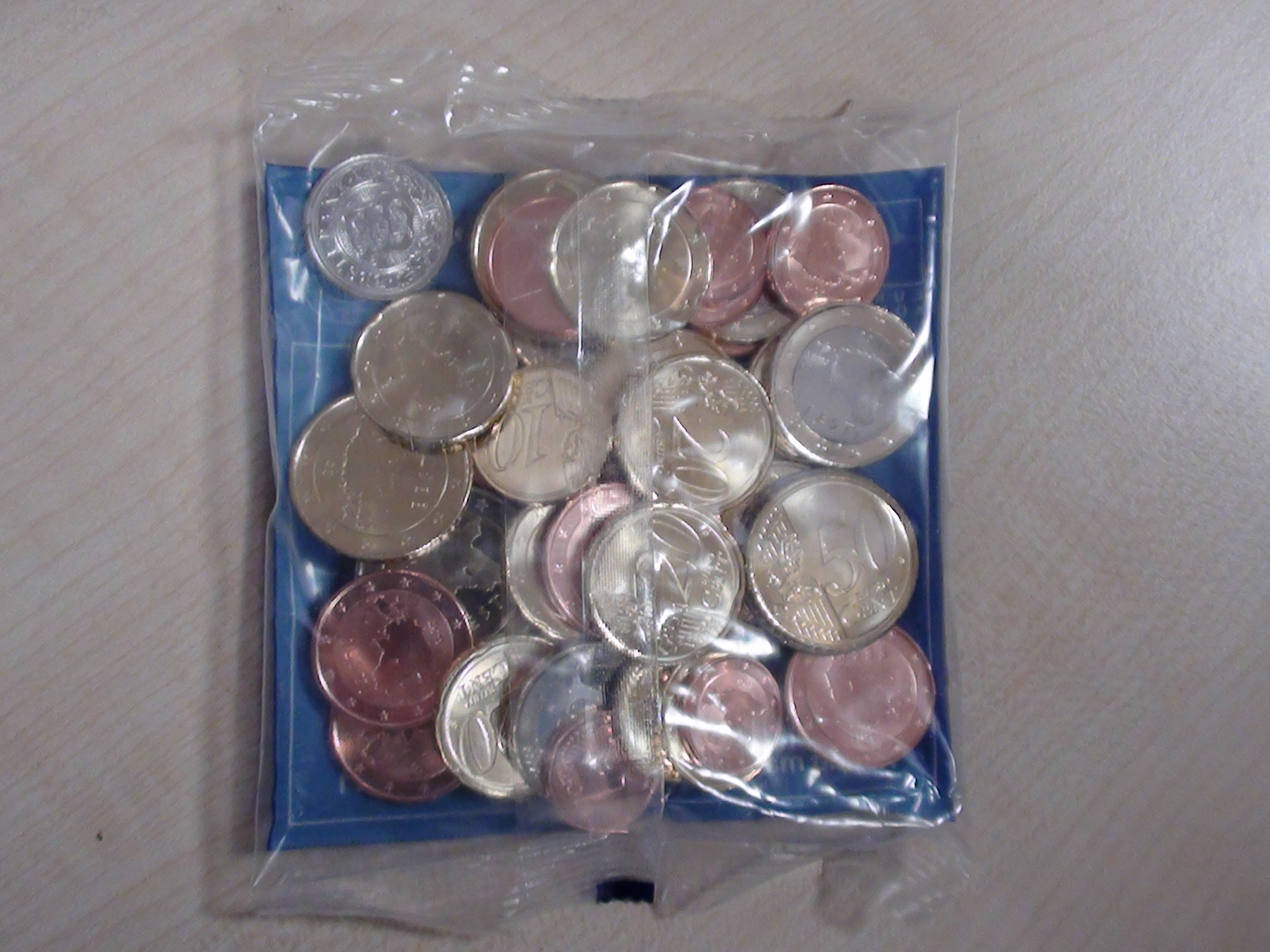 Eesti euromüntide stardikomplekt